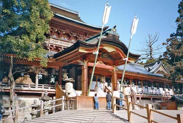 Iwashimizu Hachiman Shrine, Kyoto, Japan